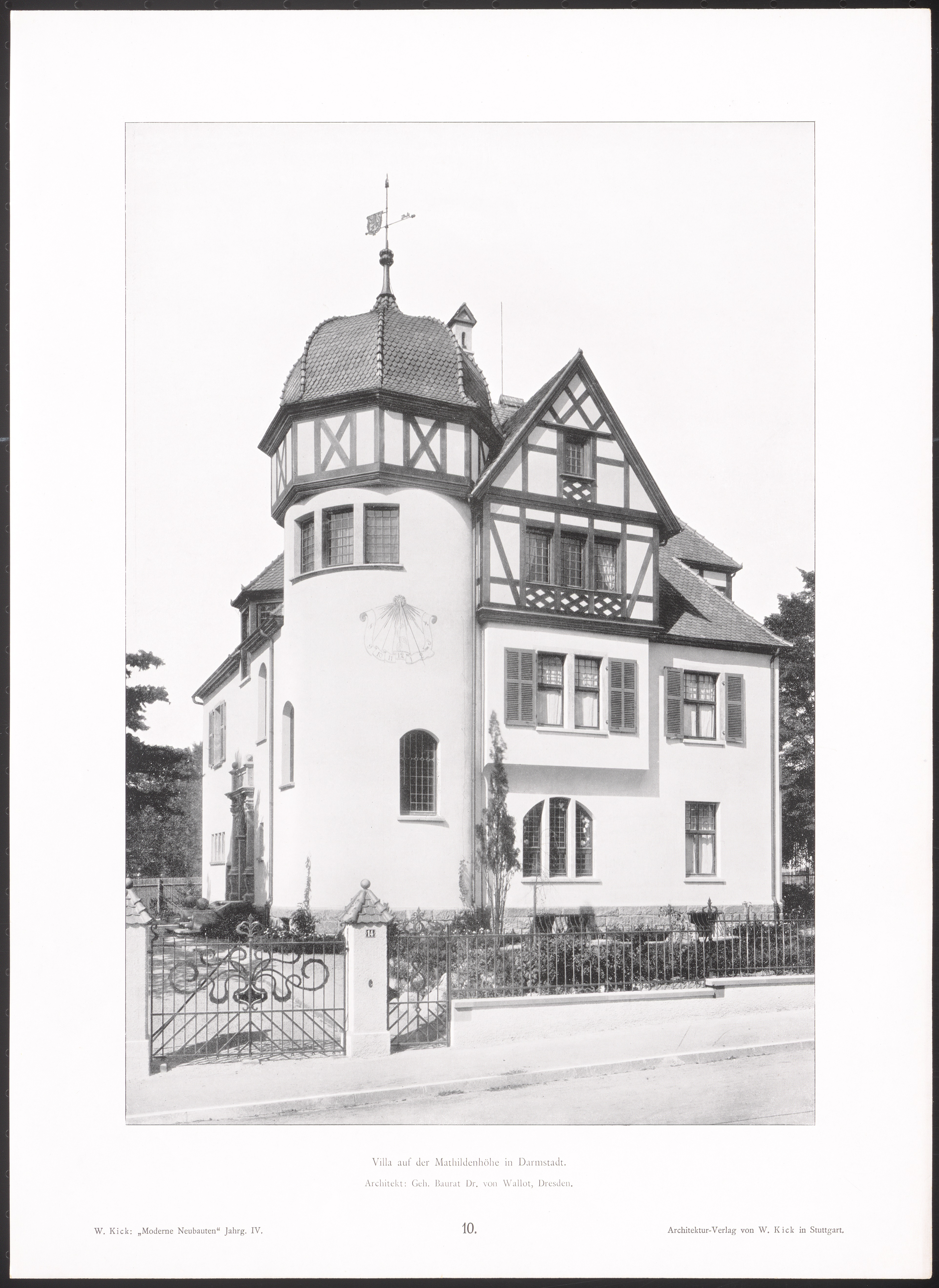 Wohnhaus für Kabinettsrat Gustav Römheld in Darmstadt, auf der Mathildenhöhe, Alexandraweg 14